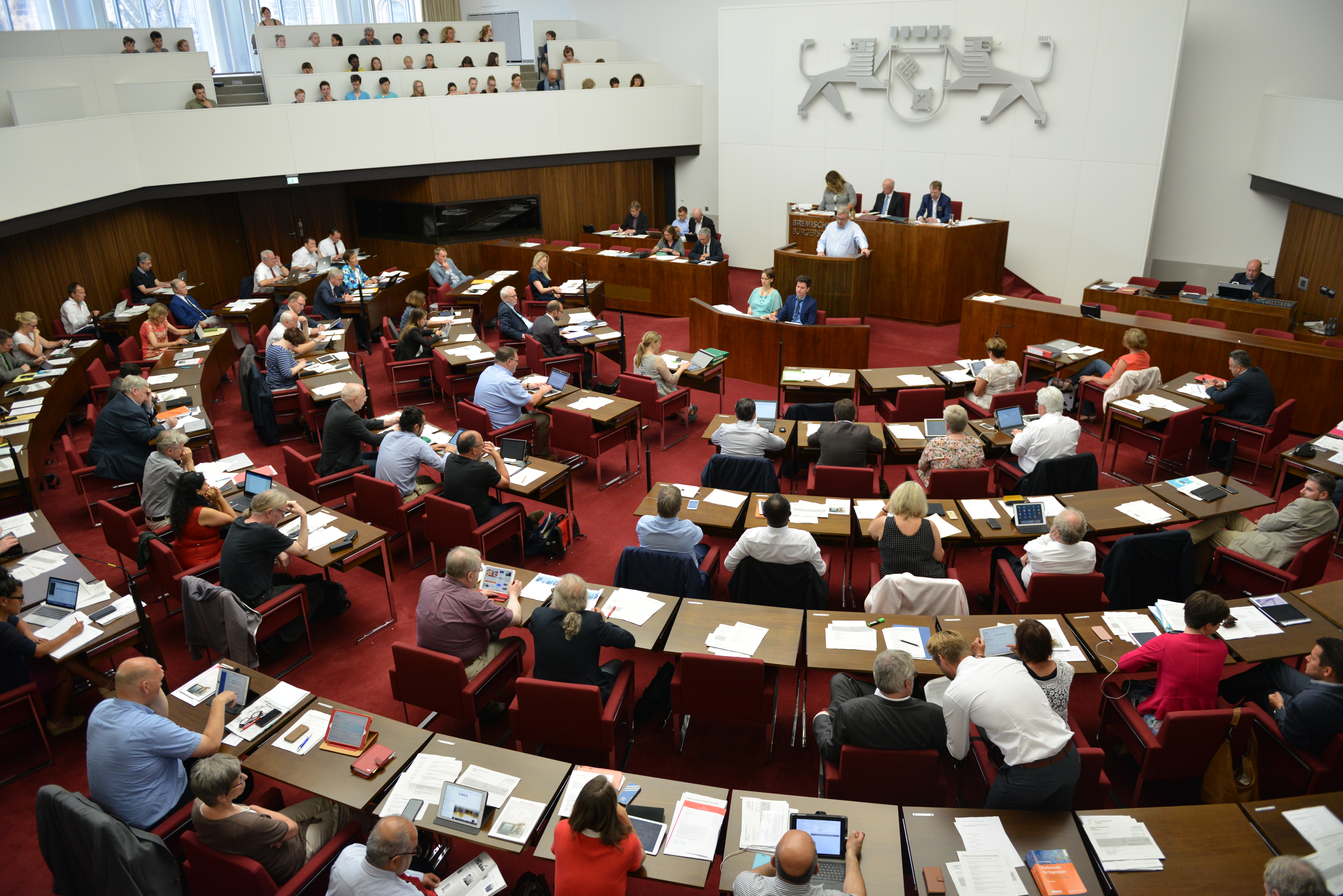 Sitzung der Bremischen Bürgerschaft im Mai 2018